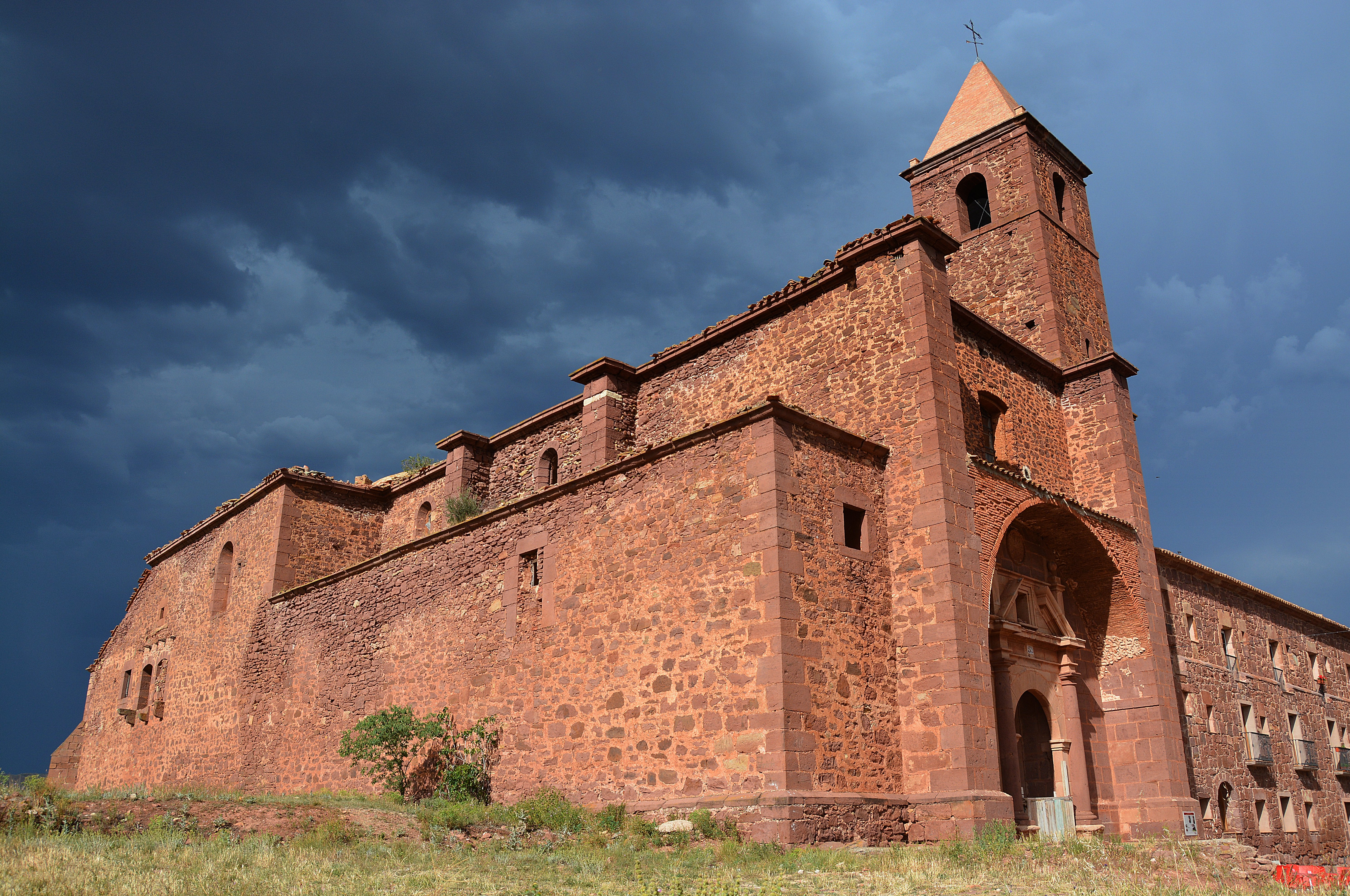 El nombre de Gotor es de origen visigodo, pero el origen de la población y su primer asentamiento es mucho más antiguo Según los estudiosos, el nombre de Gotor es de origen visigodo, pero el origen de la población y su primer asentamiento es mucho más antiguo, ya que existe un yacimiento celtíbero en el actual paraje llamado El Calvario. La primera cita de Gotor es ya en la Edad Media cuando se concede la carta de donación de la villa a principios del siglo XIII. En un breve paseo por la localidad veremos como destacan las construcciones de tono rojizo por el uso de la arenisca de rodeno. Dentro de la población, se encuentra la iglesia parroquial dedicada a Santa Ana, un edificio barroco del siglo XVII, con torre de planta cuadrada al lado de la epístola. Ya en las afueras, rodeado de fértiles huertas, podremos encontrar el convento dominico de Nuestra Señora de la Consolación en estado ruinoso, pero aún así con un grandísimo interés arquitectónico, ya que marca el fenómeno de la reacción artística antimorisca de la zona. El edificio conventual es de grandes proporciones, de forma rectangular, construido en piedra. El claustro se cubre con bóvedas estrelladas y la iglesia se adorna con una puerta renacentista. Este estado de ruina se debe a la actuación de las tropas francesas en la Guerra de la Independencia y posteriormente a la desamortización de Mendizábal en 1835